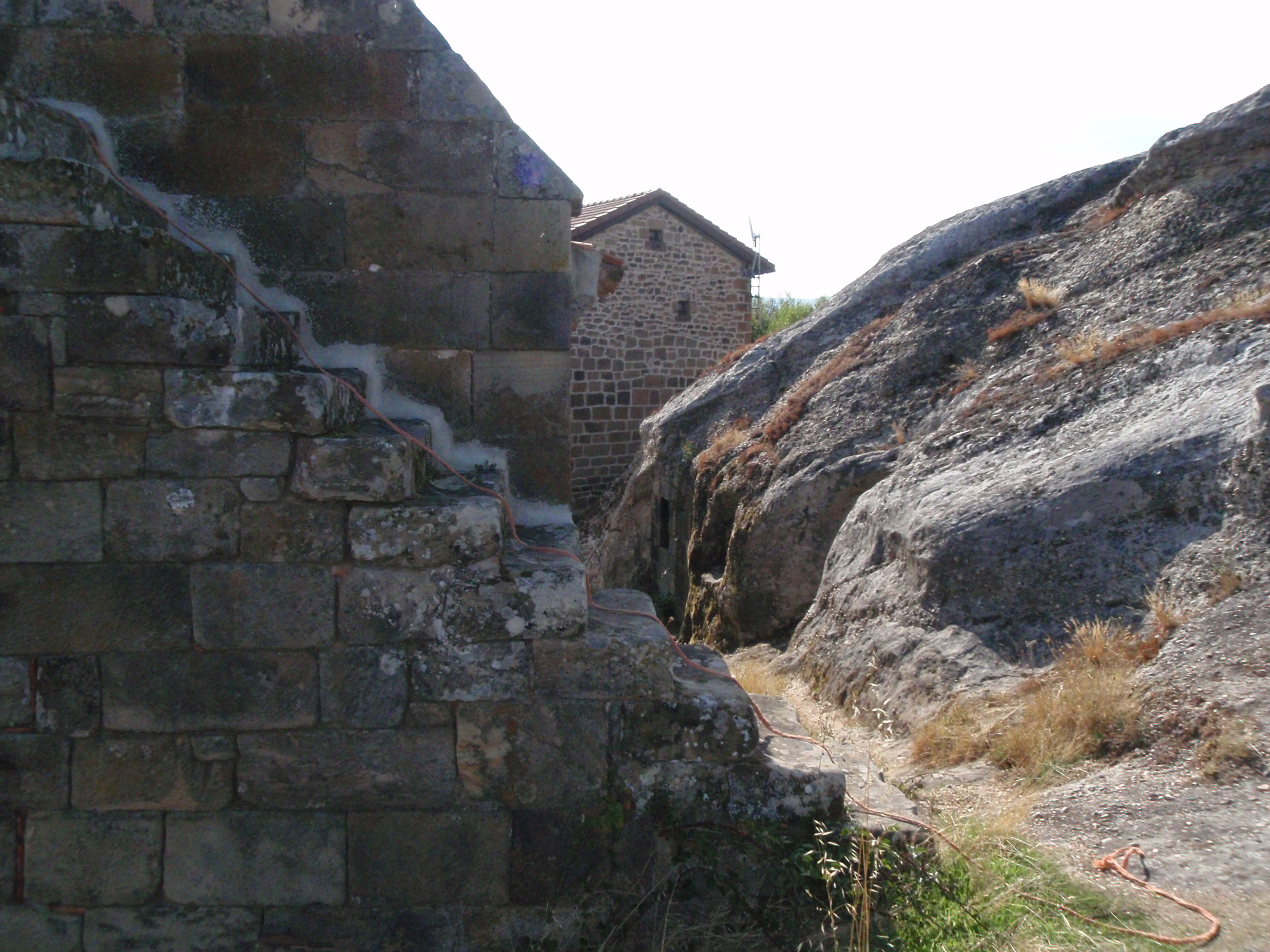 Pequeña ermita rupestre excavada en la roca, en la parte trasera de la iglesia en Campo de Ebro, Valderredible (Cantabria).